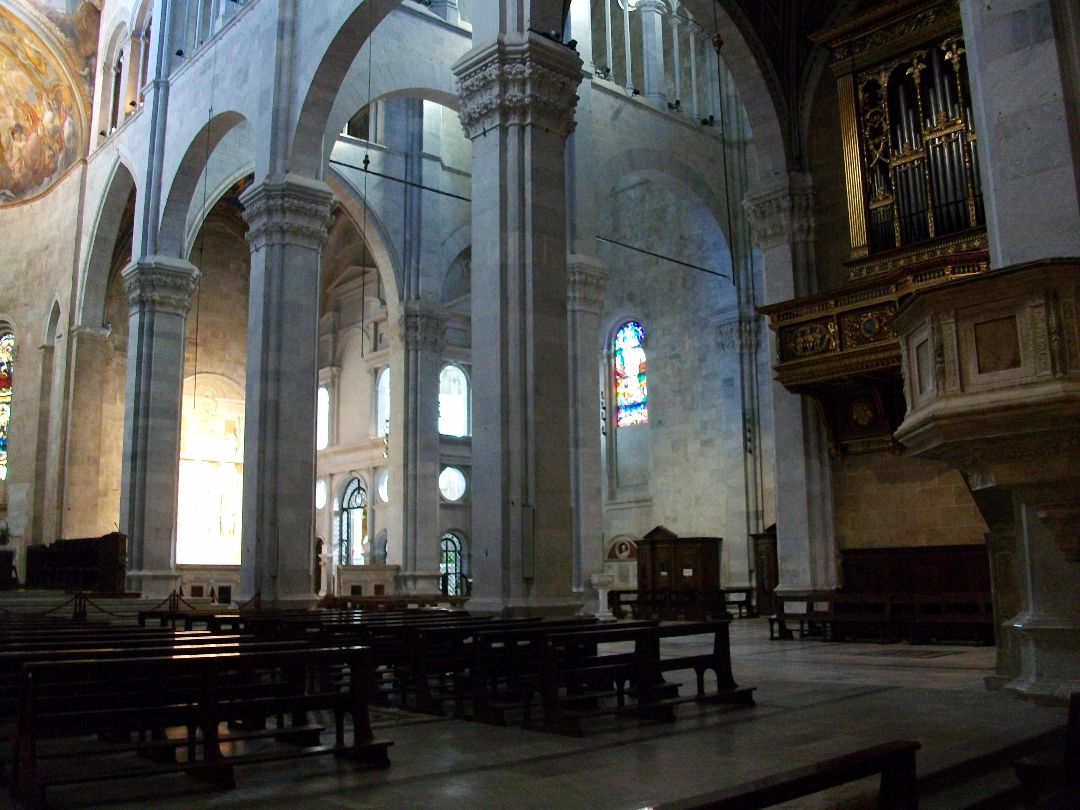 Interior del duomo de Lucca.